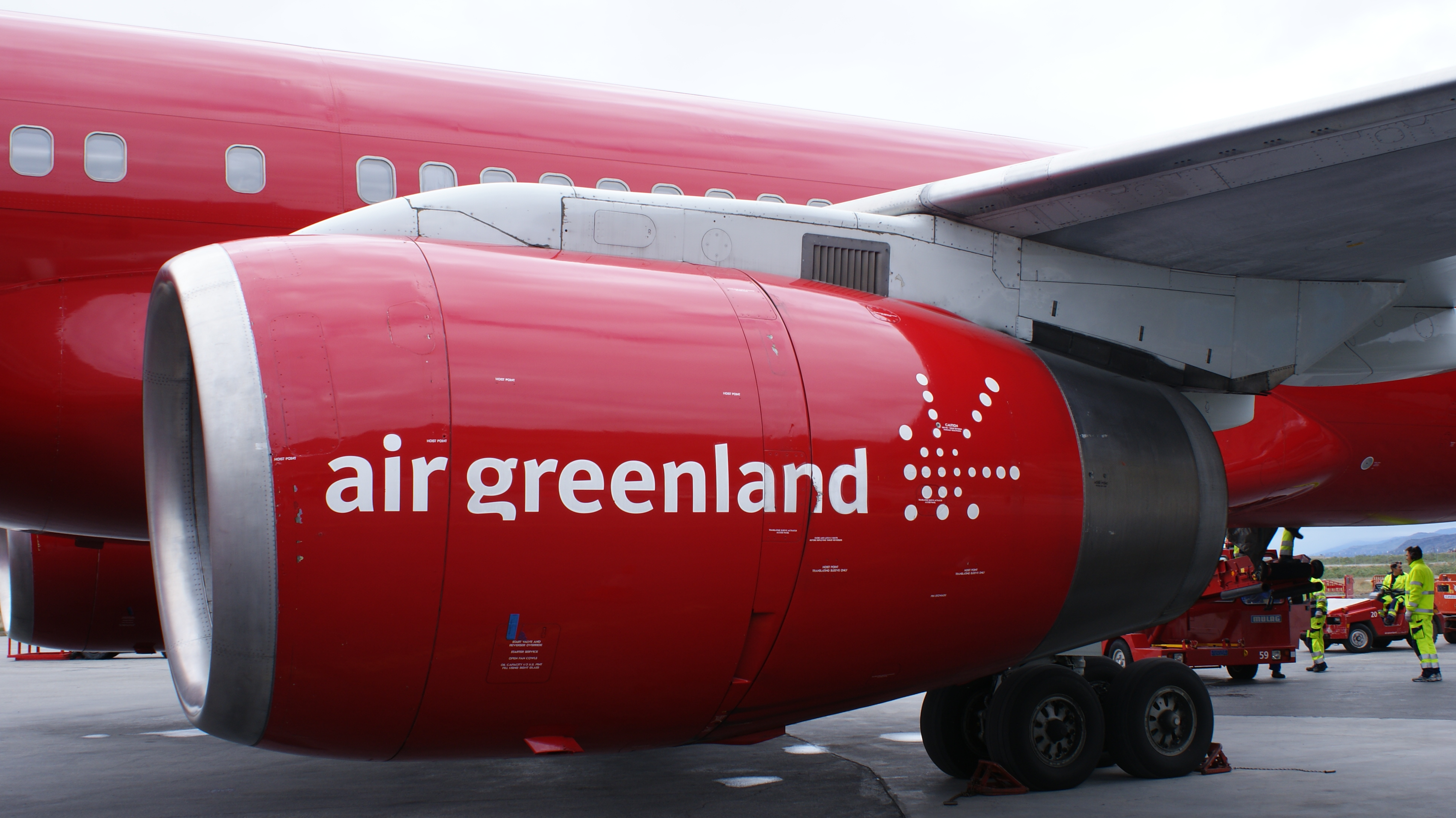 Air Greenland Boeing 757-200 at Kangerlussuaq Airport. Engine.